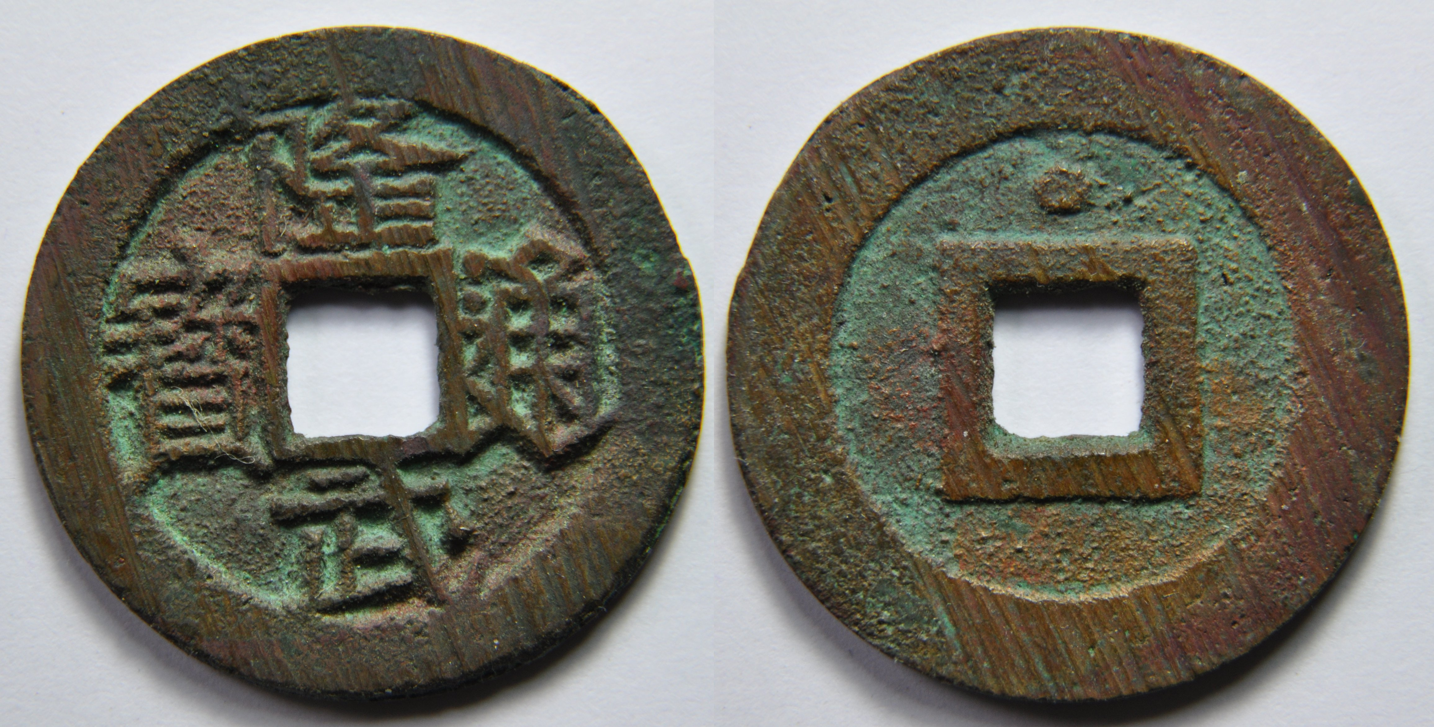 Une monnaie du prince de Tang (1645-1646), un prince de la dynastie Ming après la victoire des Qing. Cette dynastie est dite des Ming du Sud. Le prince de Tang est banni à Fengyang en Anhui jusqu'à 1644. A cette date, le prince de Fu lui ordonne de se rendre à Pingle au Guangxi. En juin 1645, à la chute du prince de Fu, il devient Administrateur du Royaume à Hangzhou au Zhejiang. En août 1645, il se proclame empereur avec le nom d'ère de Long Wu et s'installe à Fuzhou au Fujian où sont fabriquées ces monnaies. En octobre 1646, il est capturé par les Qing qui l'exécutent. A/ Long Wu tong bao (Monnaie courante de Long Wu) R/ Point en haut (Souvent, ces points sont nommés des étoiles) Dimension : 25,77 mm Poids : 4,3 g. Référence : H21.36, S1292 Indici de rareté : 13 - Très commune d'après D.Hartill